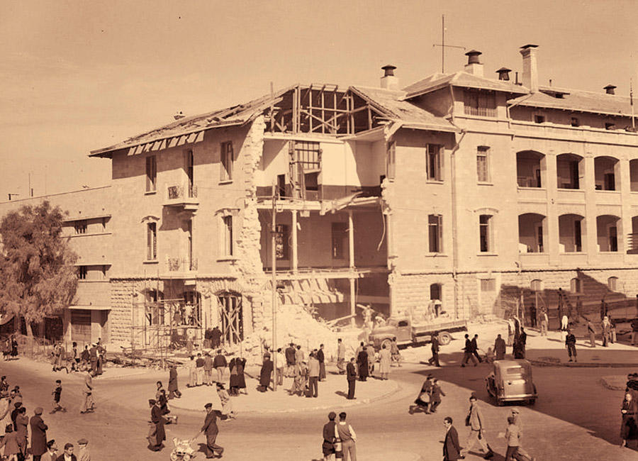 British police blow up in Jerusalem 1945. (Николаевское подворье)